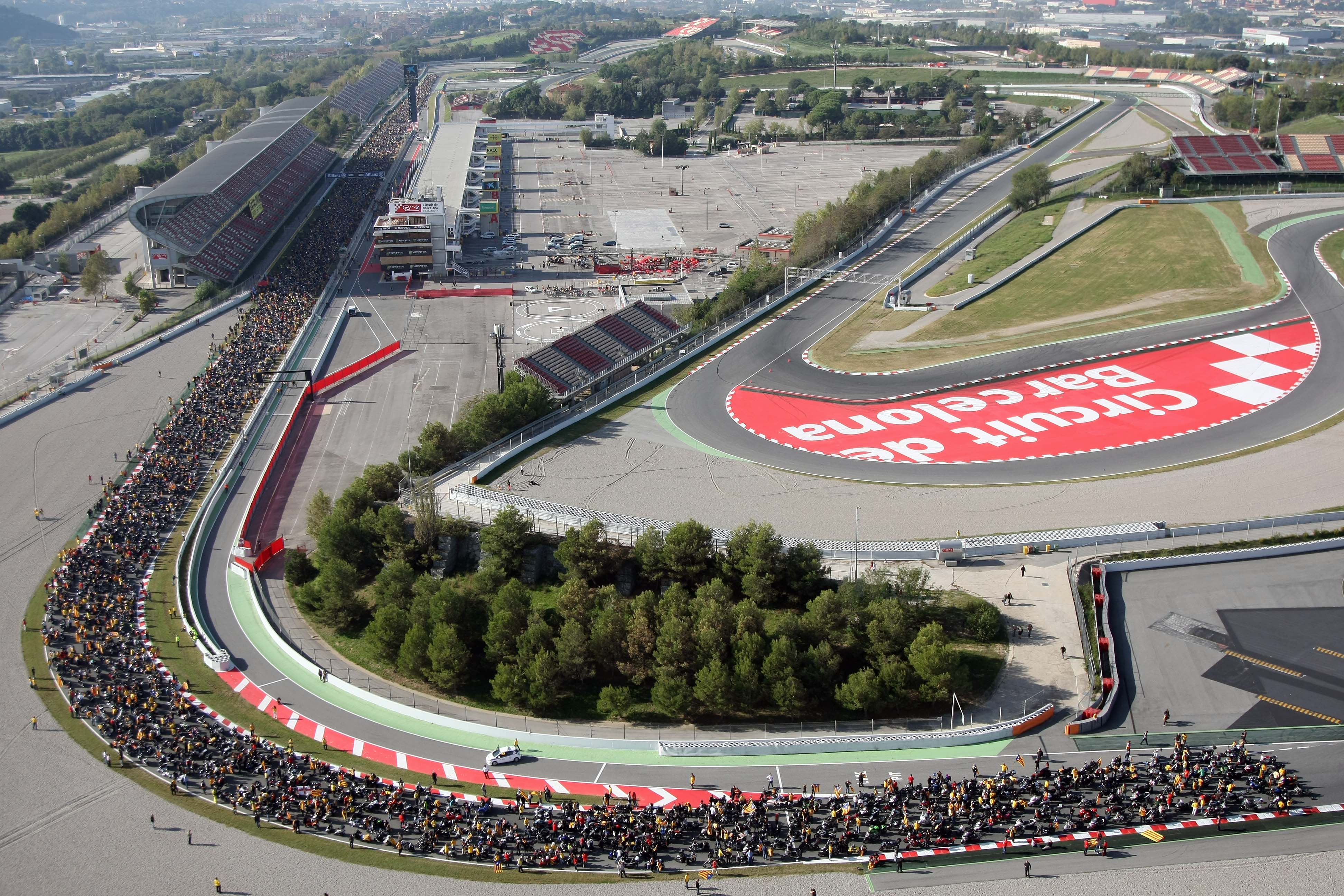 Foto aeria